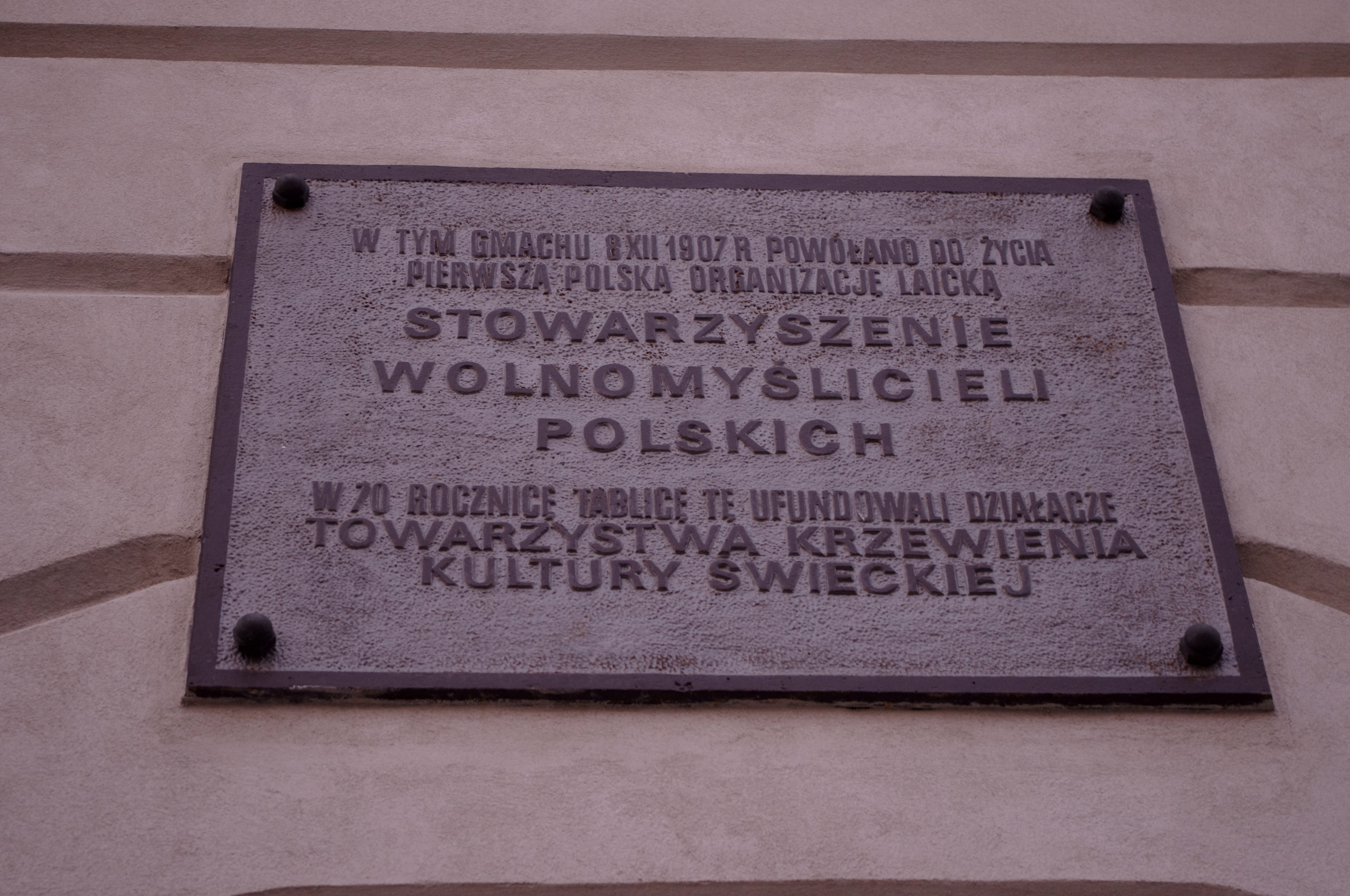 Tablica upamiętniająca Stowarzyszenie Wolnomyślicieli Polskich na budynku Centralnej Biblioteki Rolniczej na Krakowskim Przedmieściu w Warszawie